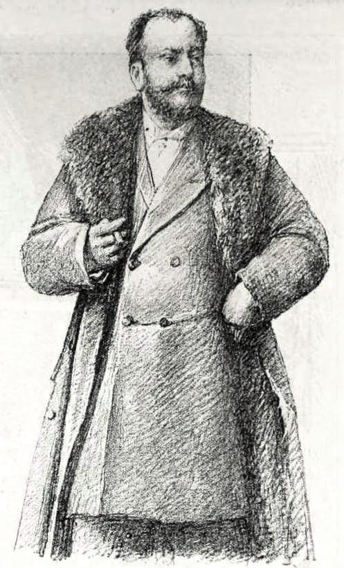 "M. A. Fargon [sic], député du Puy-de-Dôme."